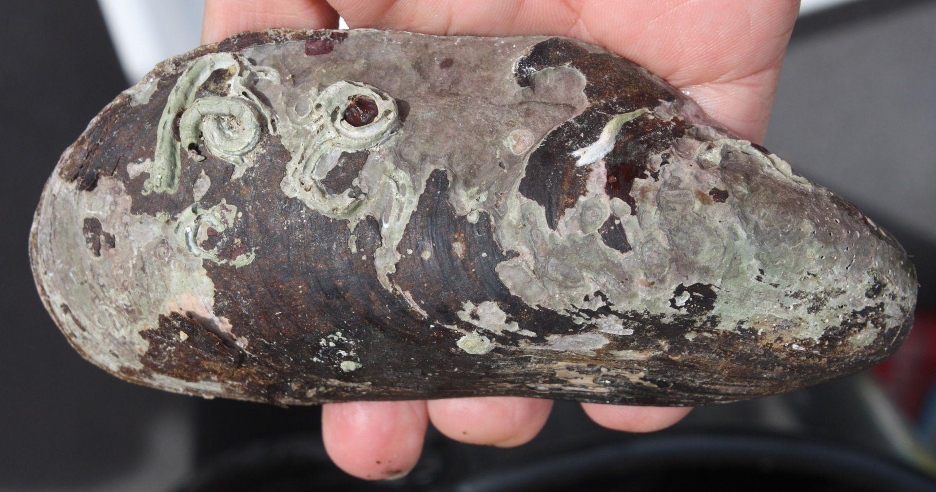 O-skjell Modiolus modiolus.Template:Byline